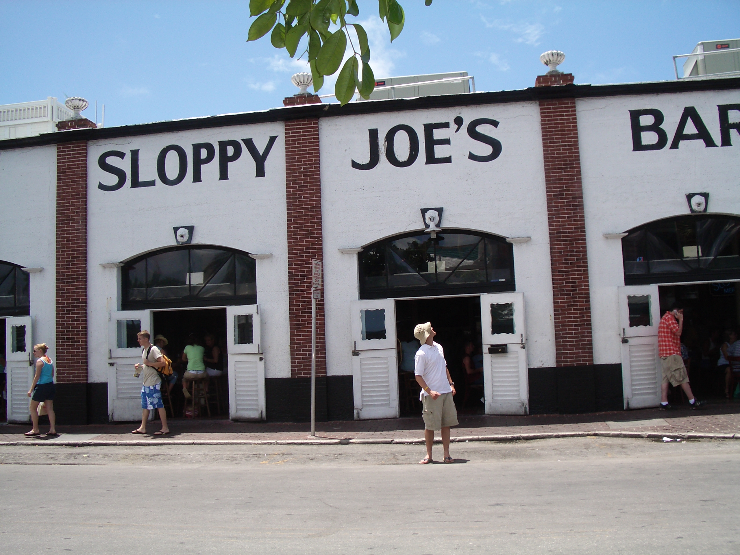 חזית הבר סלופי ג'וז הפונה לרחוב גרין.